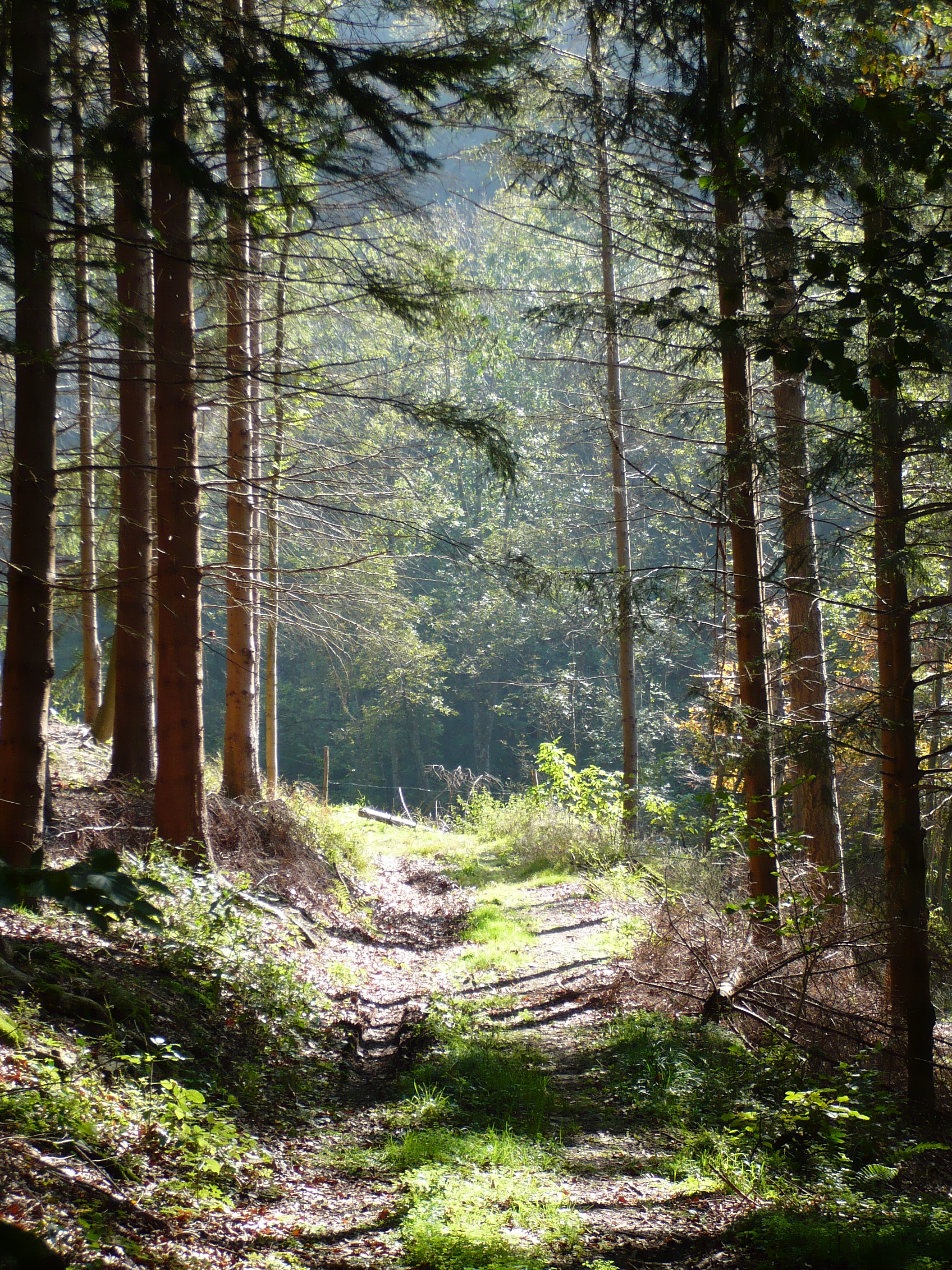 Teil des Urgrabens als Urweg heute